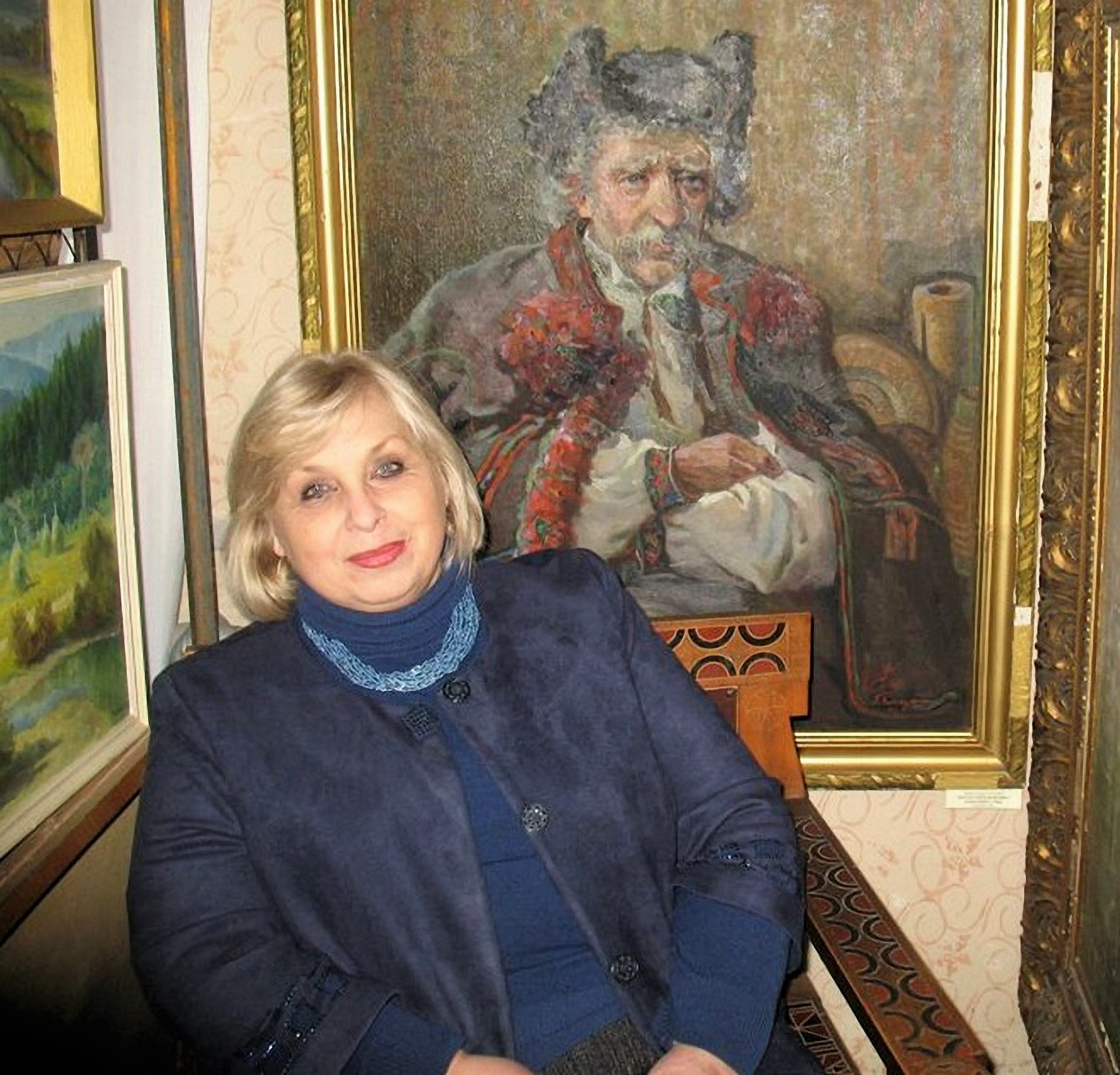 Ярослава Юріївна ТКАЧУК, генеральний директор Національного музею народного мистецтва Гуцульщини та Покуття імені Й. Кобринського